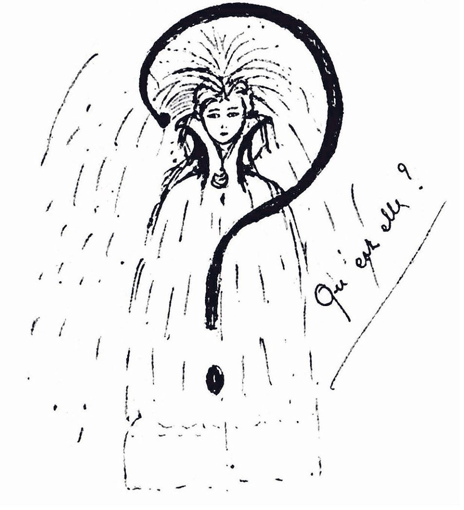 Zeichnung aus dem Jahr 1926, in: André Breton: Nadja. Gallimard, Paris 1928, Dessin de Nadja